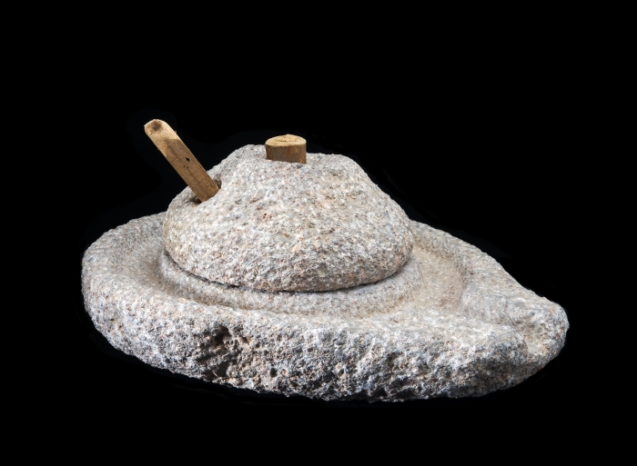 De molen wordt gebruikt voor het persen van olie uit noten van de arganboom nadat deze noten eerst geroosterd zijn of in water gekookt. Onder het draaien van de bovenste molensteen m.b.v. de uitstekende handvat worden de noten in het middengat, waar de as zich bevindt, gestrooid en fijngewreven tussen de stenen. De olie komt terecht in de goot en kan via de tuit opgevangen worden. De olie kan gebruikt worden voor de fabricage van zeep en voor verlichting, maar dient voornamelijk voor huishoudelijke consumptie. De arganboom (Argania Sideroxylon) is een naaldboom die buiten Marokko onbekend is en alleen groeit tussen de Atlantische kust en de Hoge- en Anti-Atlasgebergten (de Sousvallei).